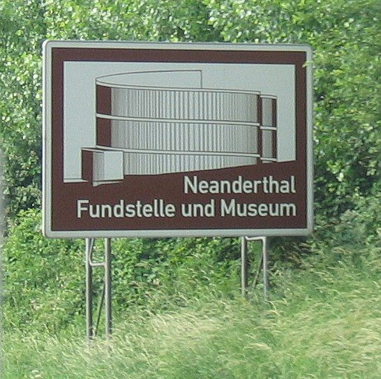 Unterrichtungstafel an der A3 von Köln Richtung Oberhausen an der Neanderthal-Brücke bei Erkrath